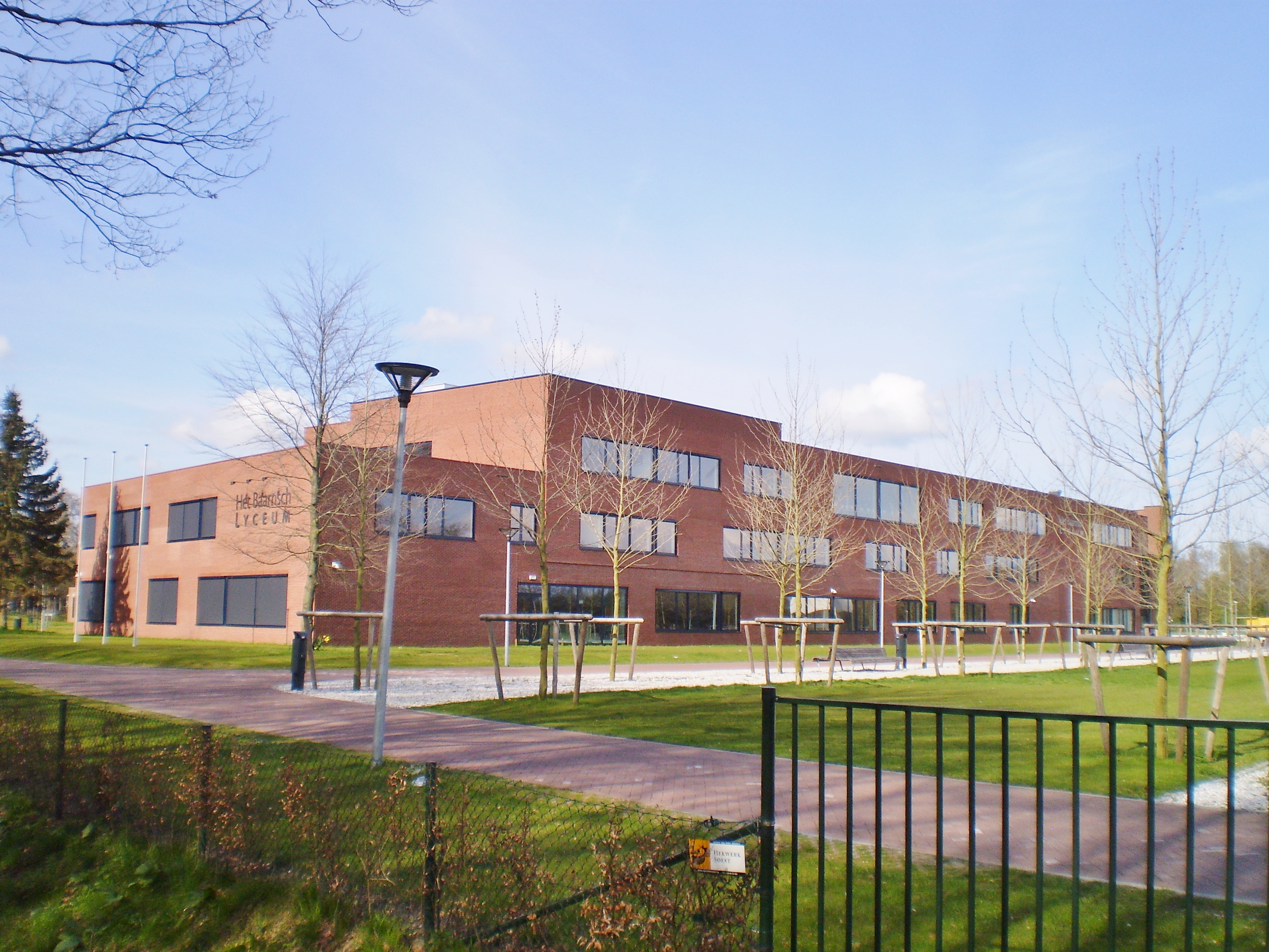 Baarns Lyseum